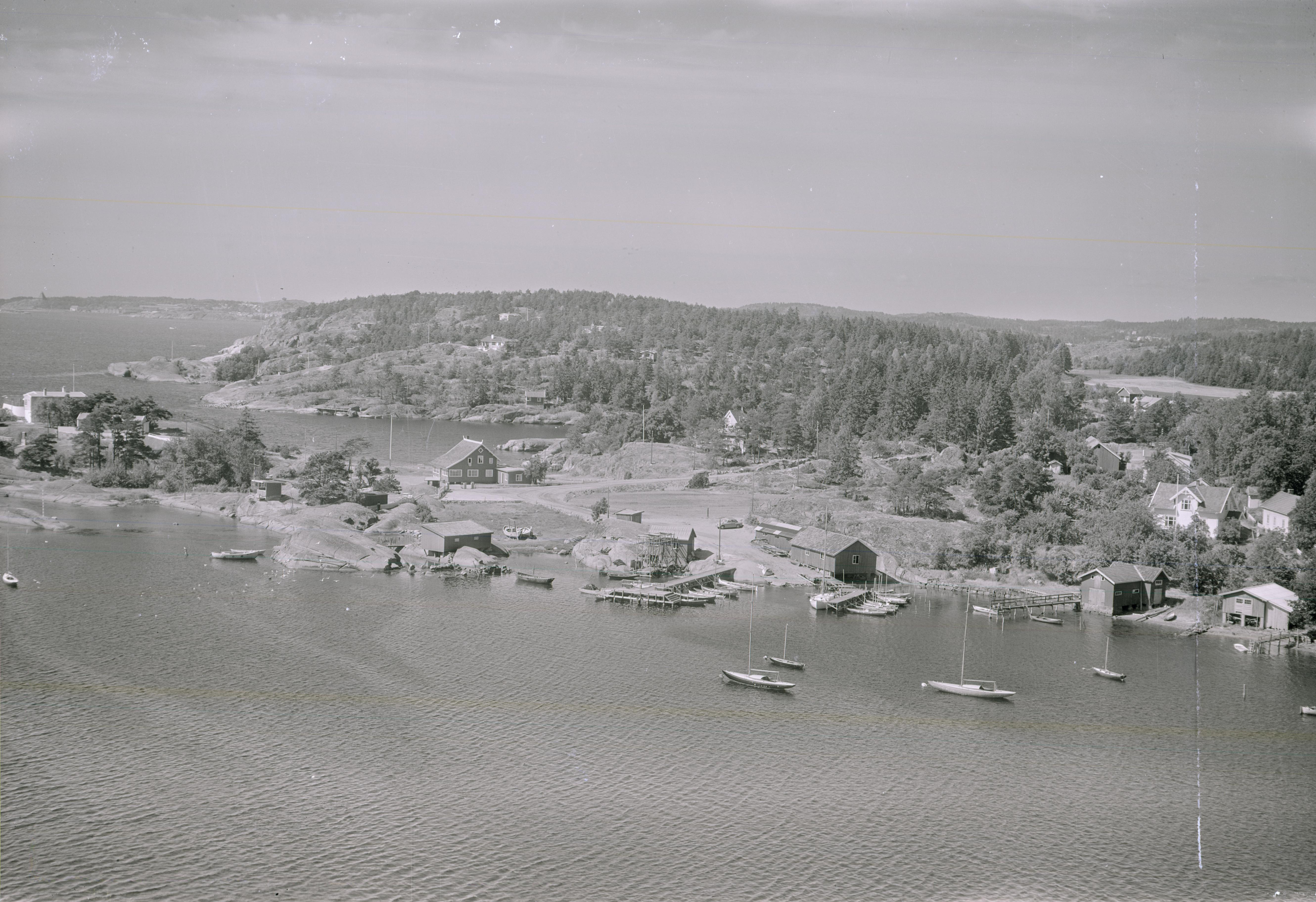 WF.HL.131204 Larvik Seilerforening Seilerhytta i Viksfjord